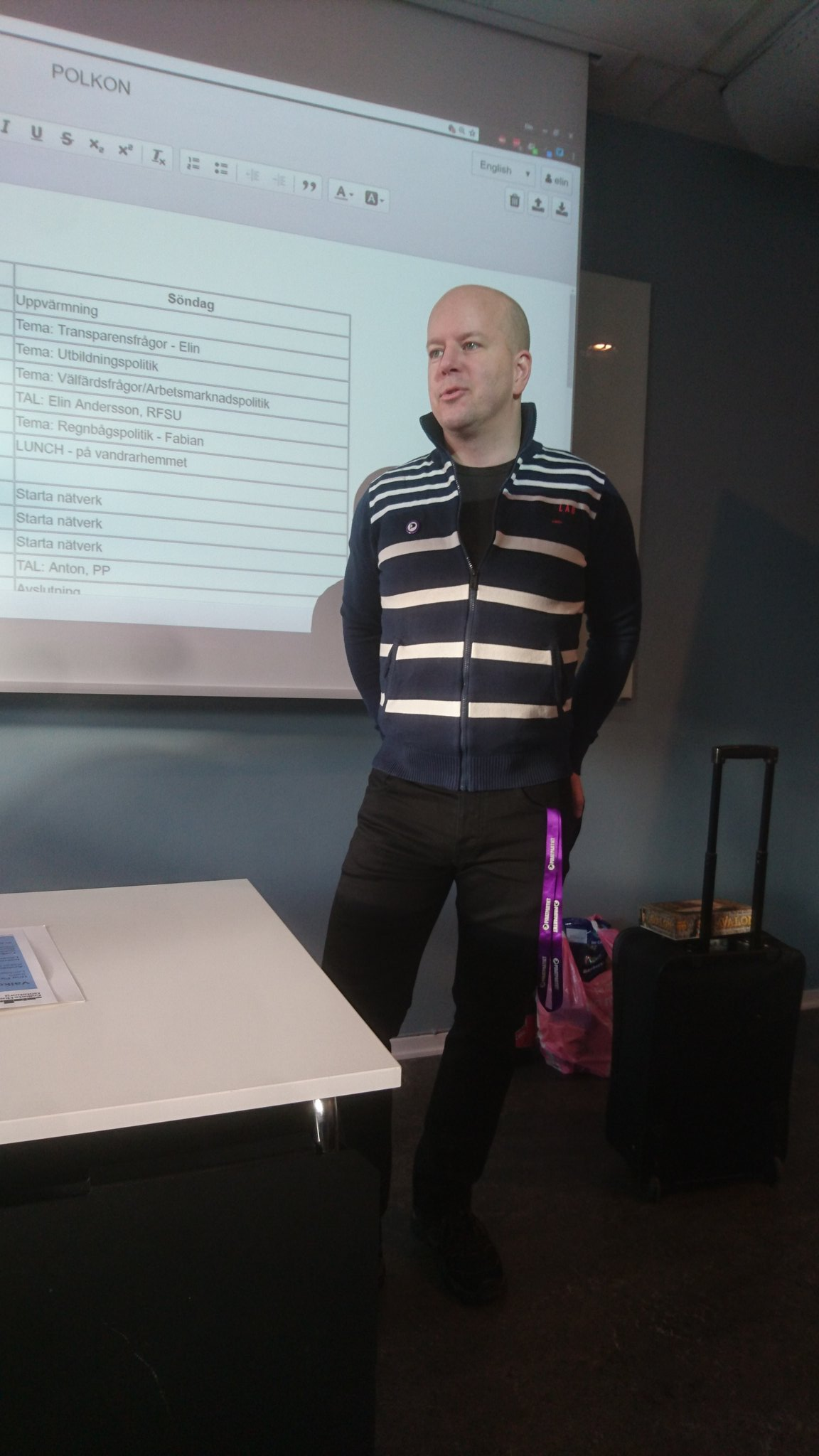 Piratpartiets partiledare Magnus Andersson talar på Ung Pirats konferens Polkon 2016.